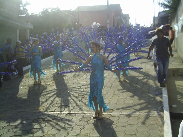 itzapa